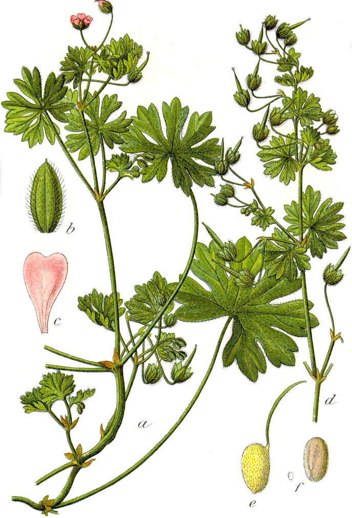 Geranium pusillum Burm.f. Original Caption Kleines Geranium, Geranium pusillum